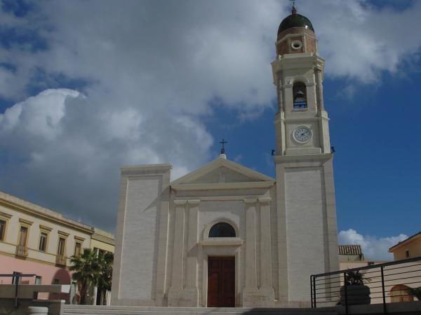 Chiesa di Santa Barbara Sinnai